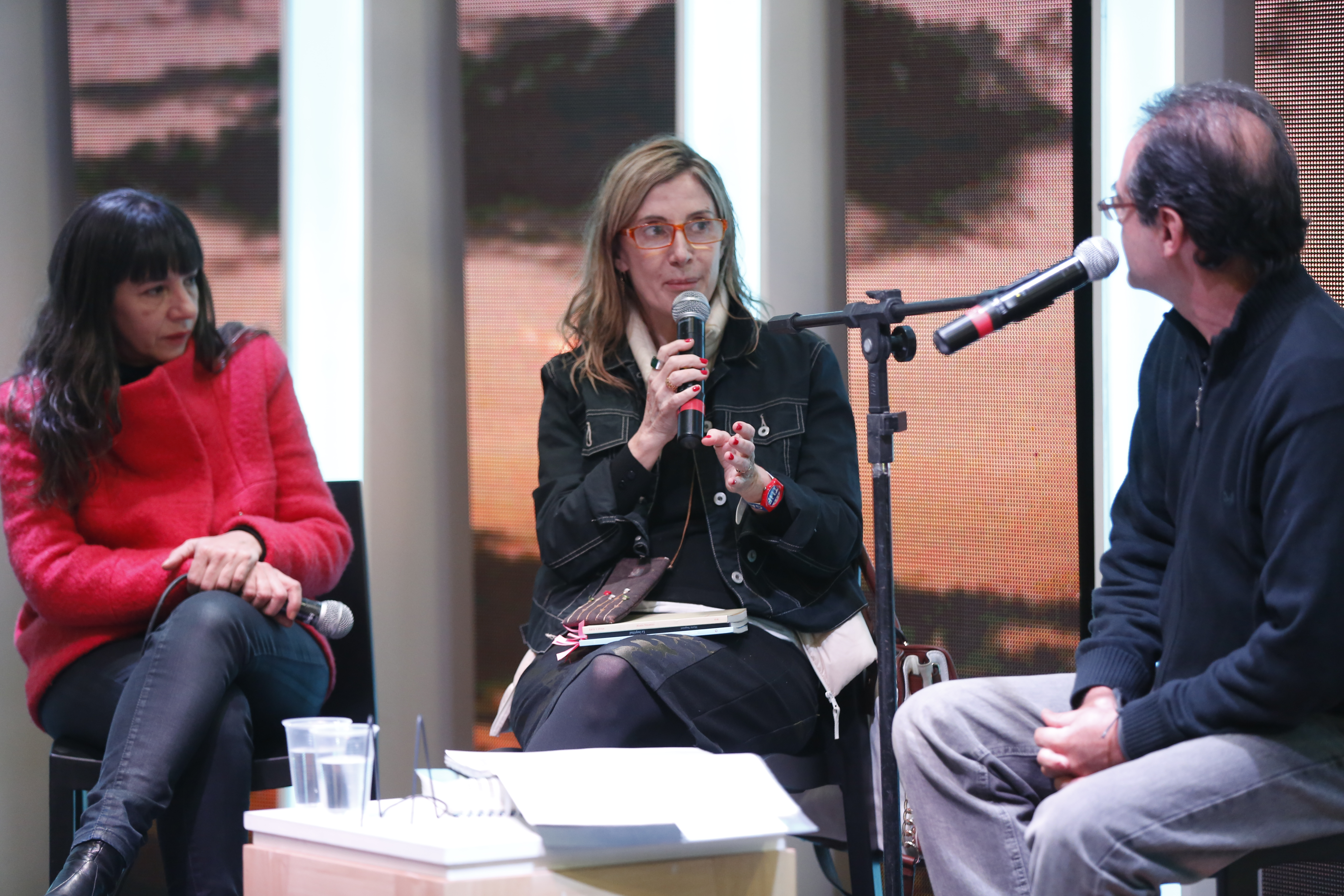 Gabriela Comte, María Negroni y Jorge Fandermole. Ciclo Letra y música con Jorge Fandermole y María Negroni - 41ª Feria Internacional del Libro de Buenos Aires.